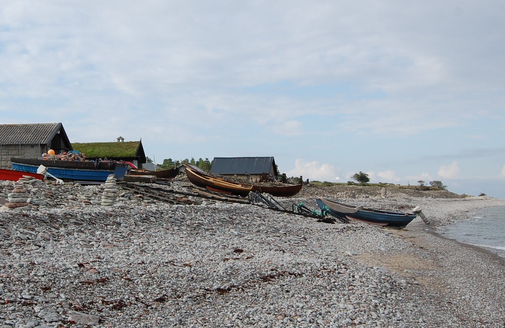 Jordhamn auf Öland, Strand, Blick nach Süden